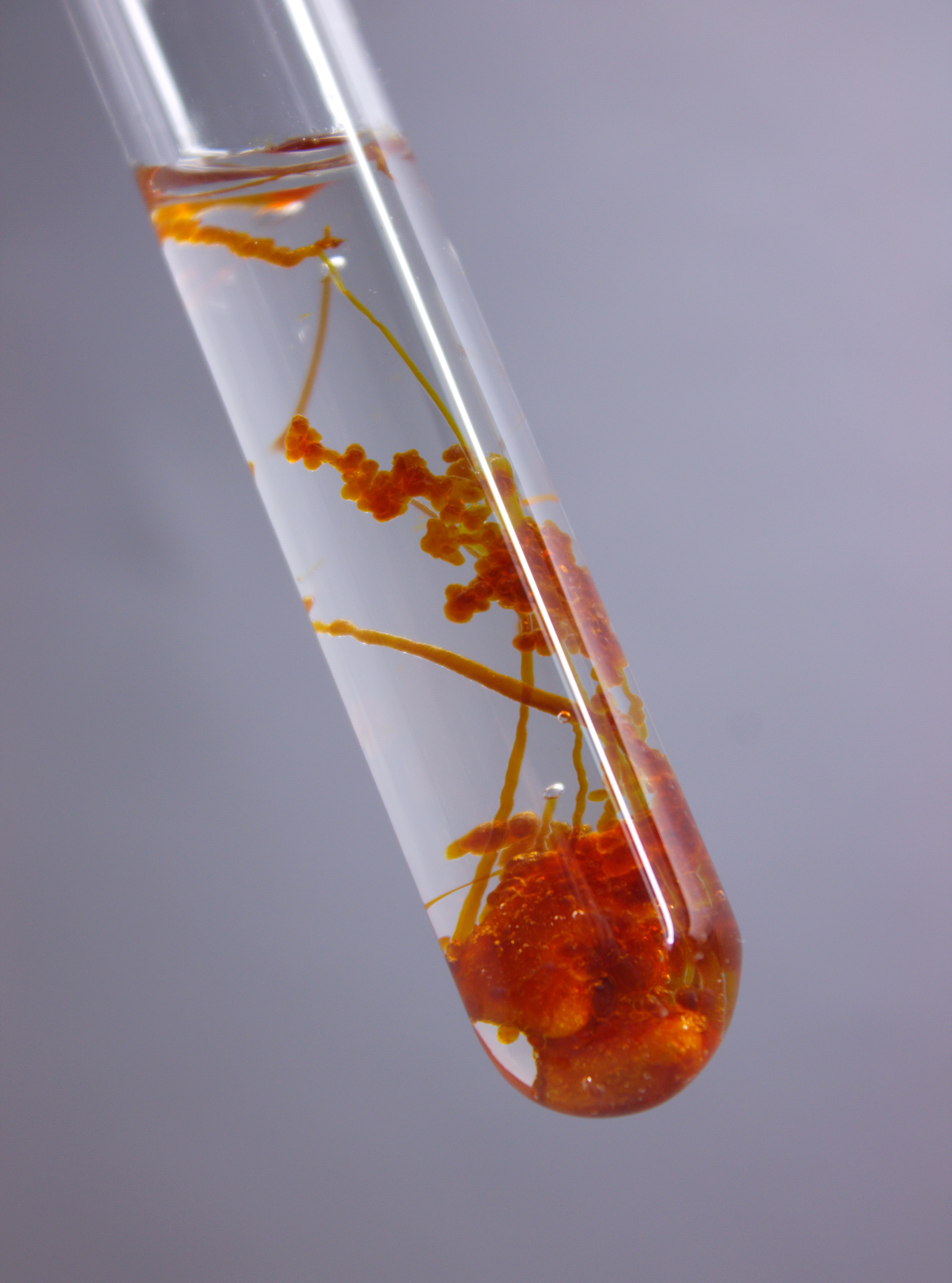 Srpski (latinica): Ekperiment silikatna bašta (gvožđe)